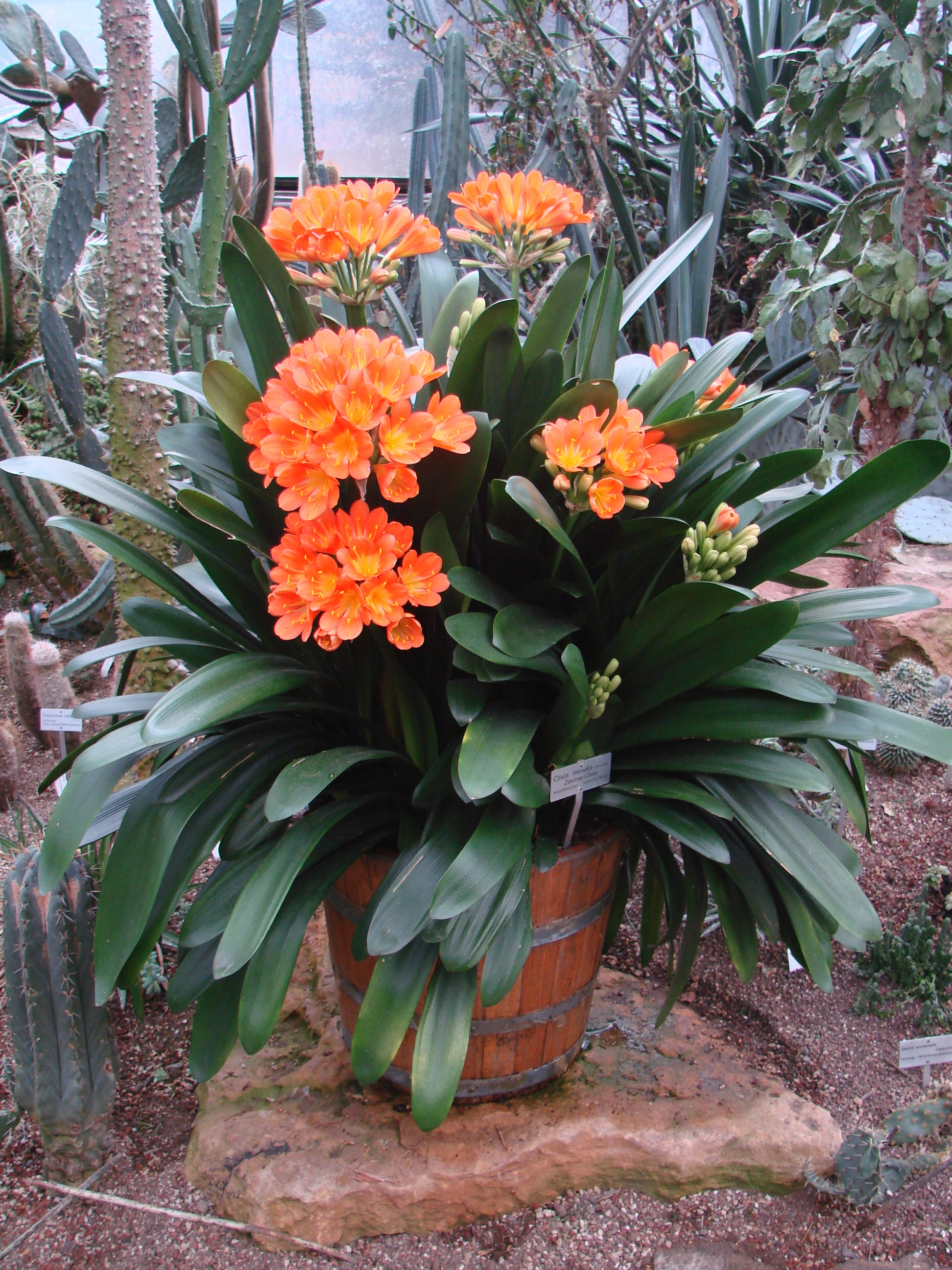 Jardin botanique de l'Université de Zurich (Suisse) : Clivia miniata (Lindl.) Bosse